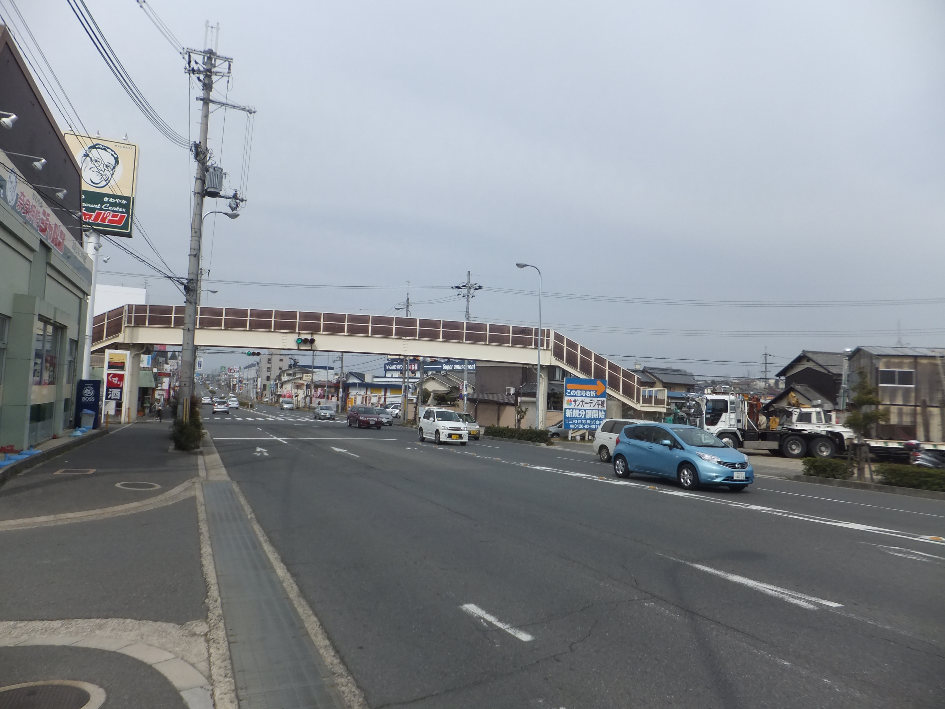 奈良県奈良市中山町 奈良県道・京都府道52号奈良精華線